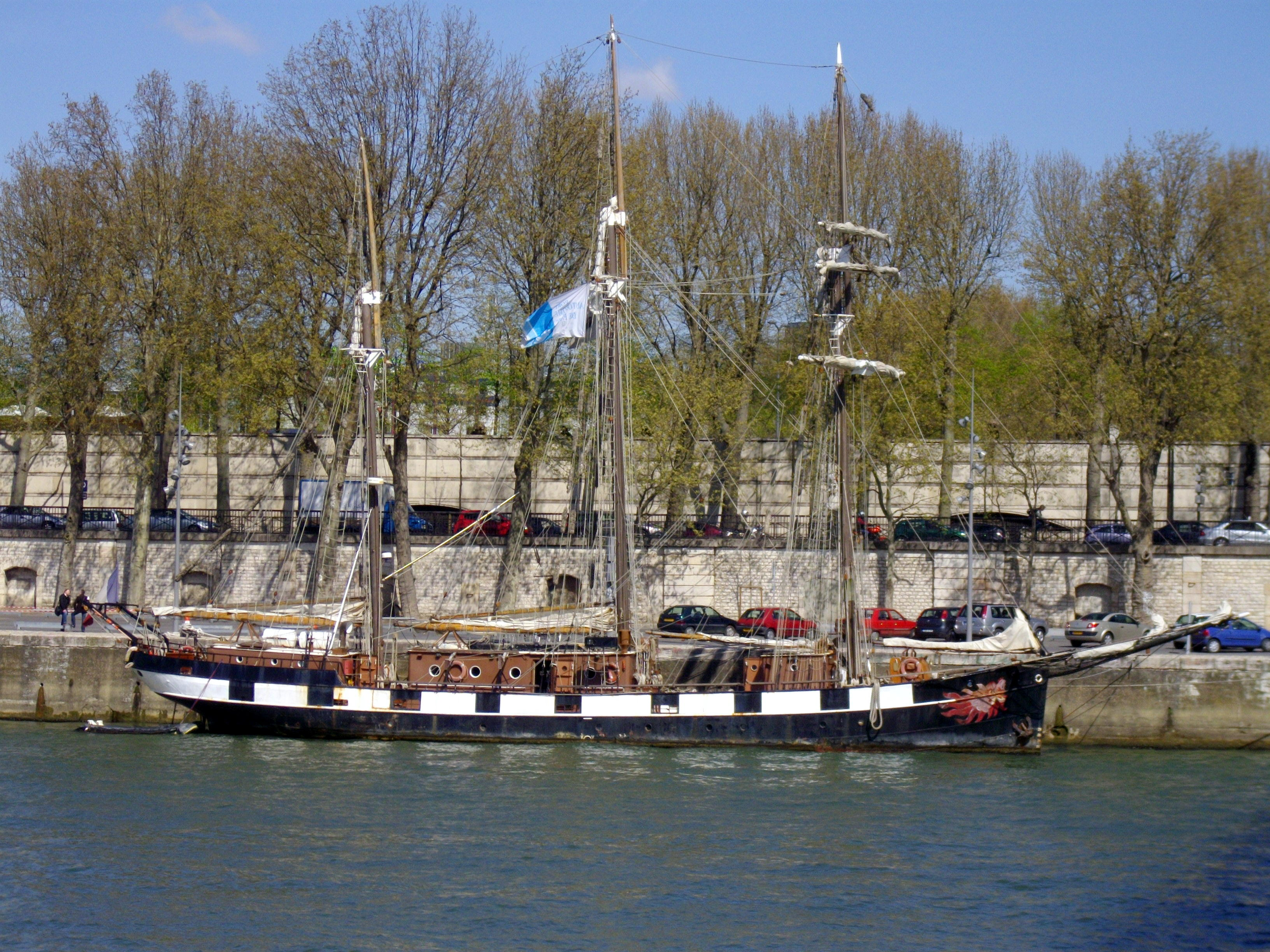 Le trois-mâts français La Boudeuse à Paris, quai de Bercy